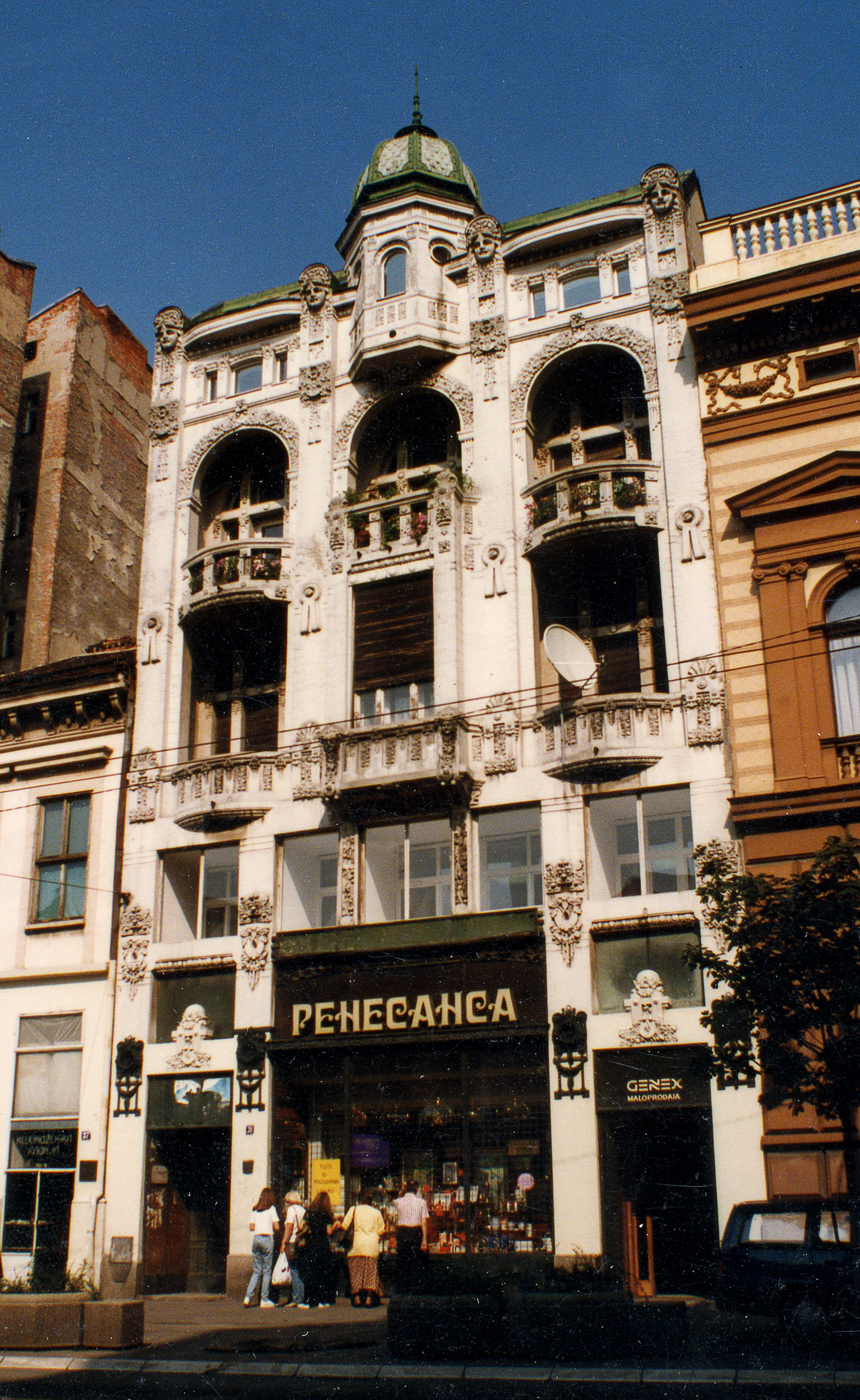 Снимак из 1995.